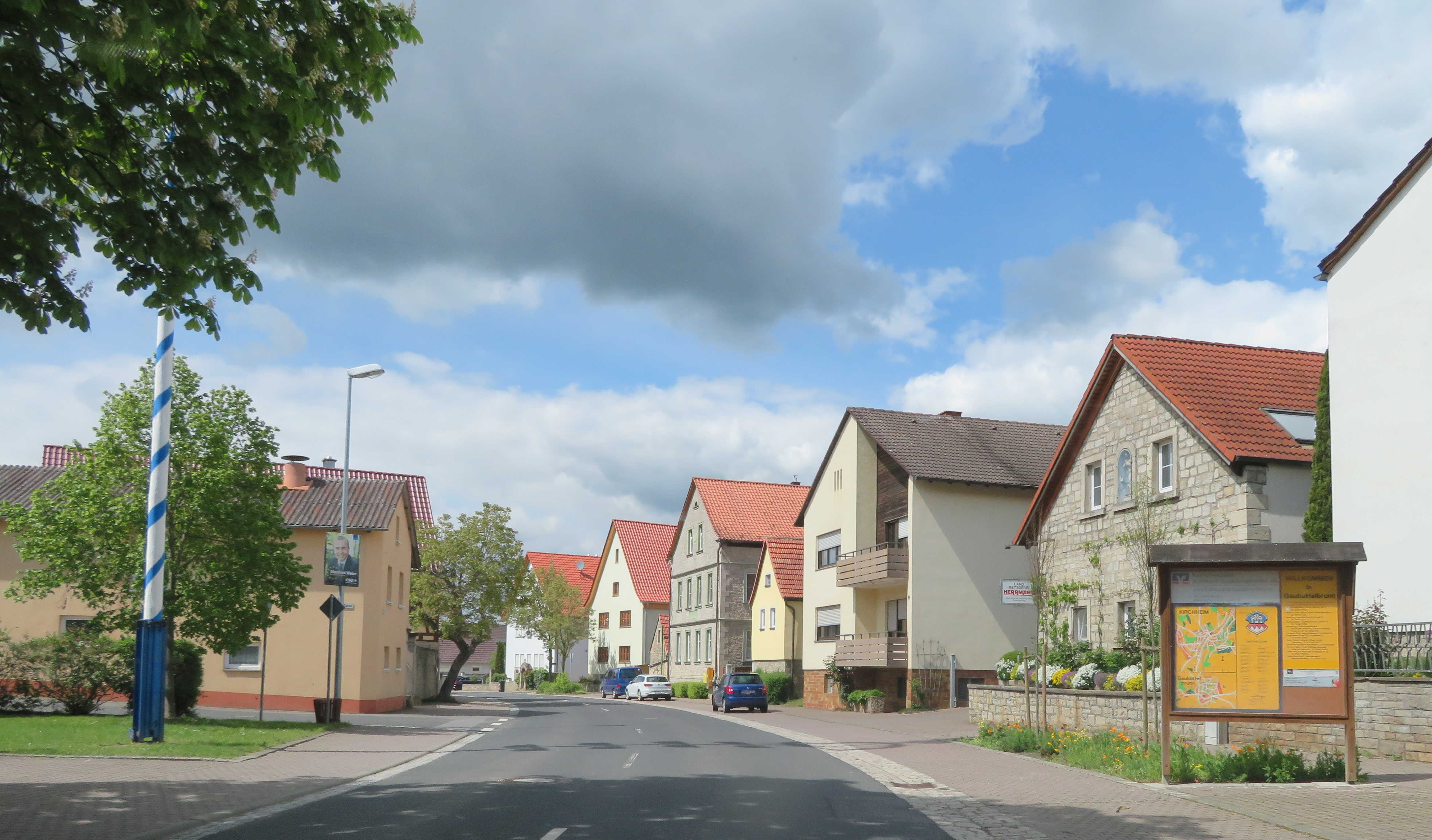 Gaubüttelbrunn